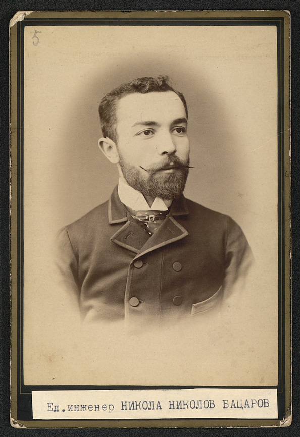 Никола Бацаров.